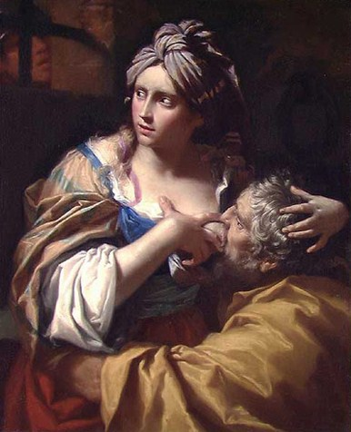 Caridad romana,title QS:P1476,es:"Caridad romana," label QS:Les,"Caridad romana,"